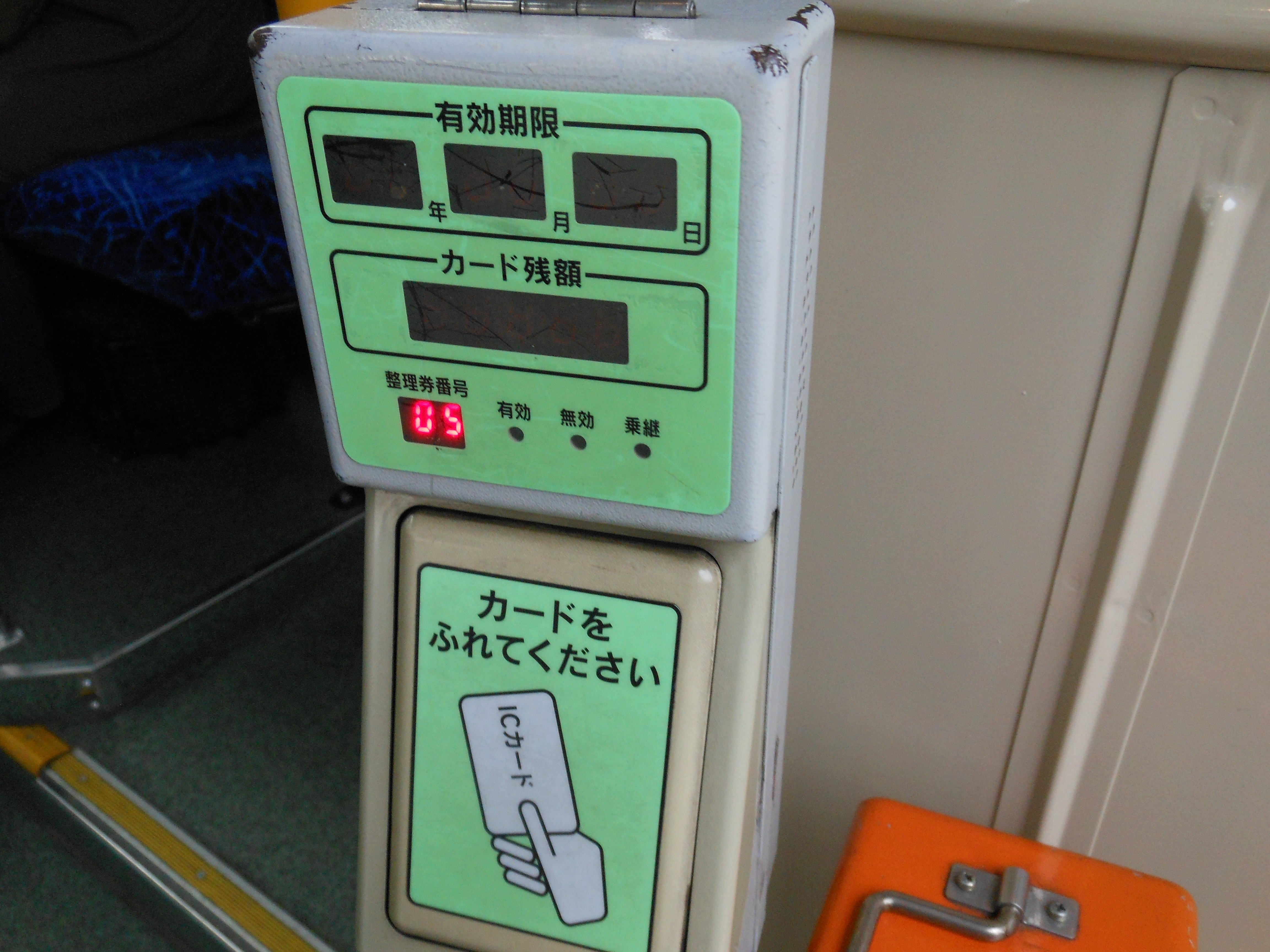 北九州市営バス（北九州市交通局）の乗車口に設置されているICカードリーダー